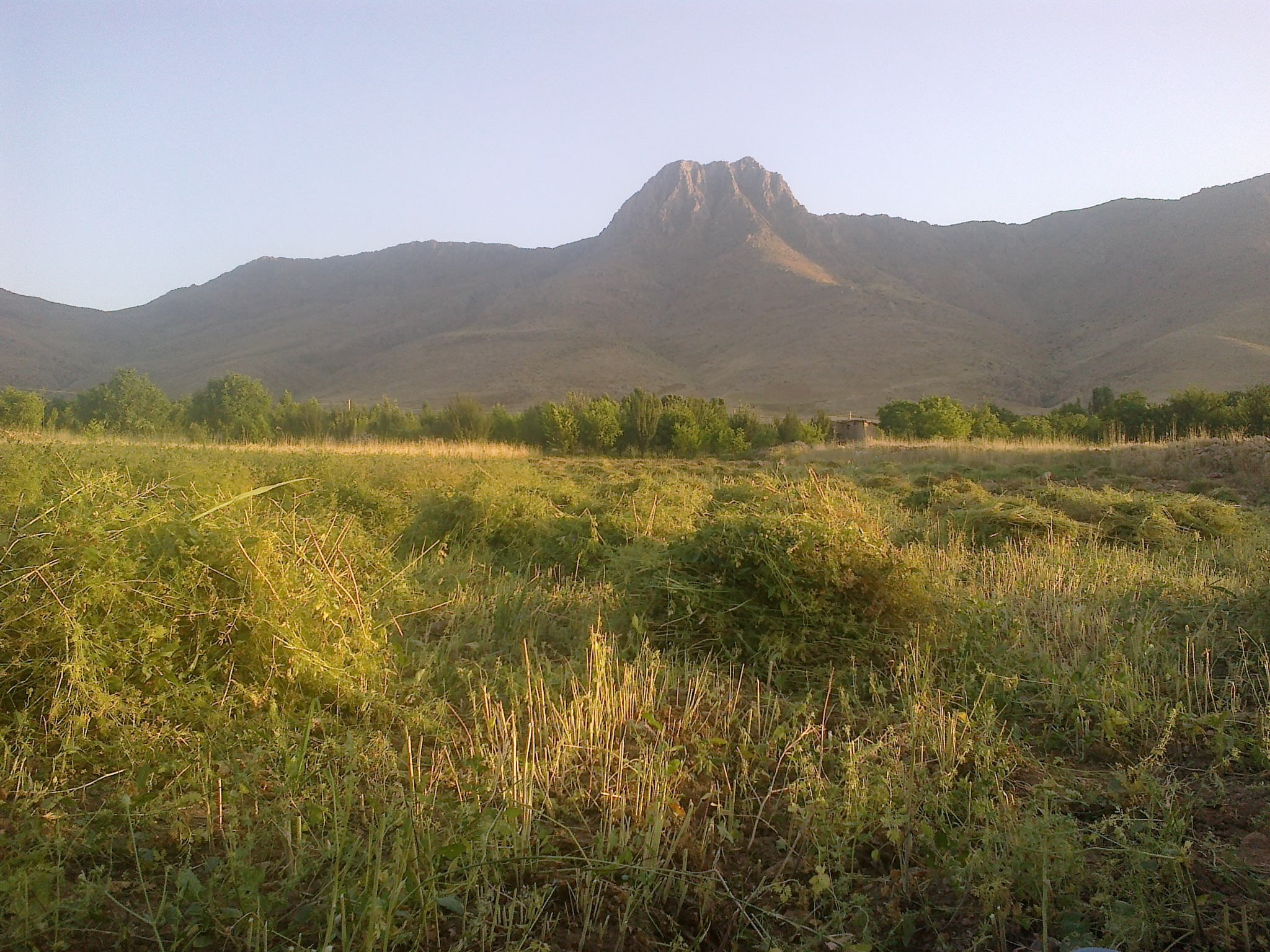 sangkar.delfan